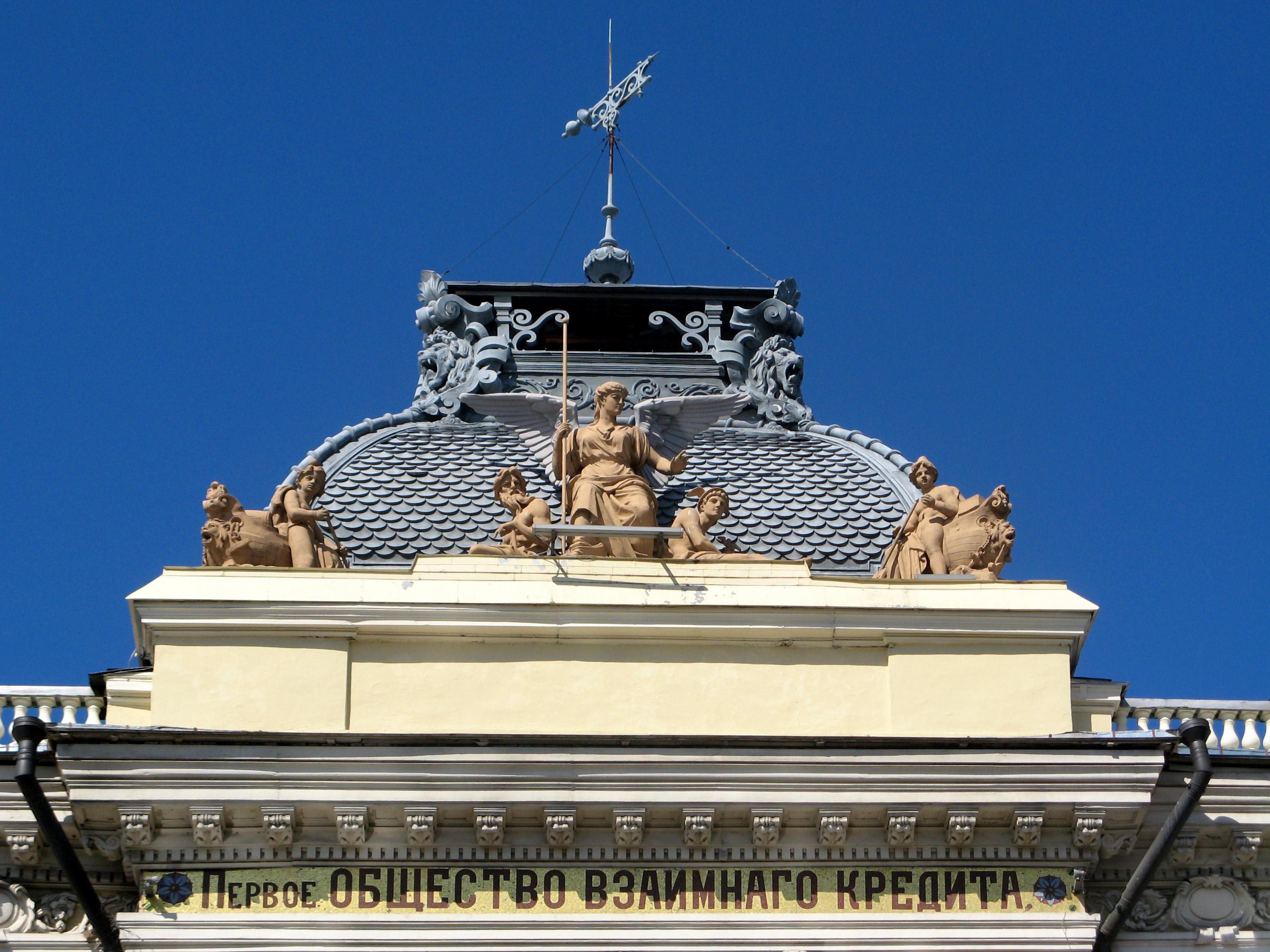 Первое Санкт-Петербургское Общество взаимного кредита: набережная канала Грибоедова, 13, Центральный район, Санкт-Петербург